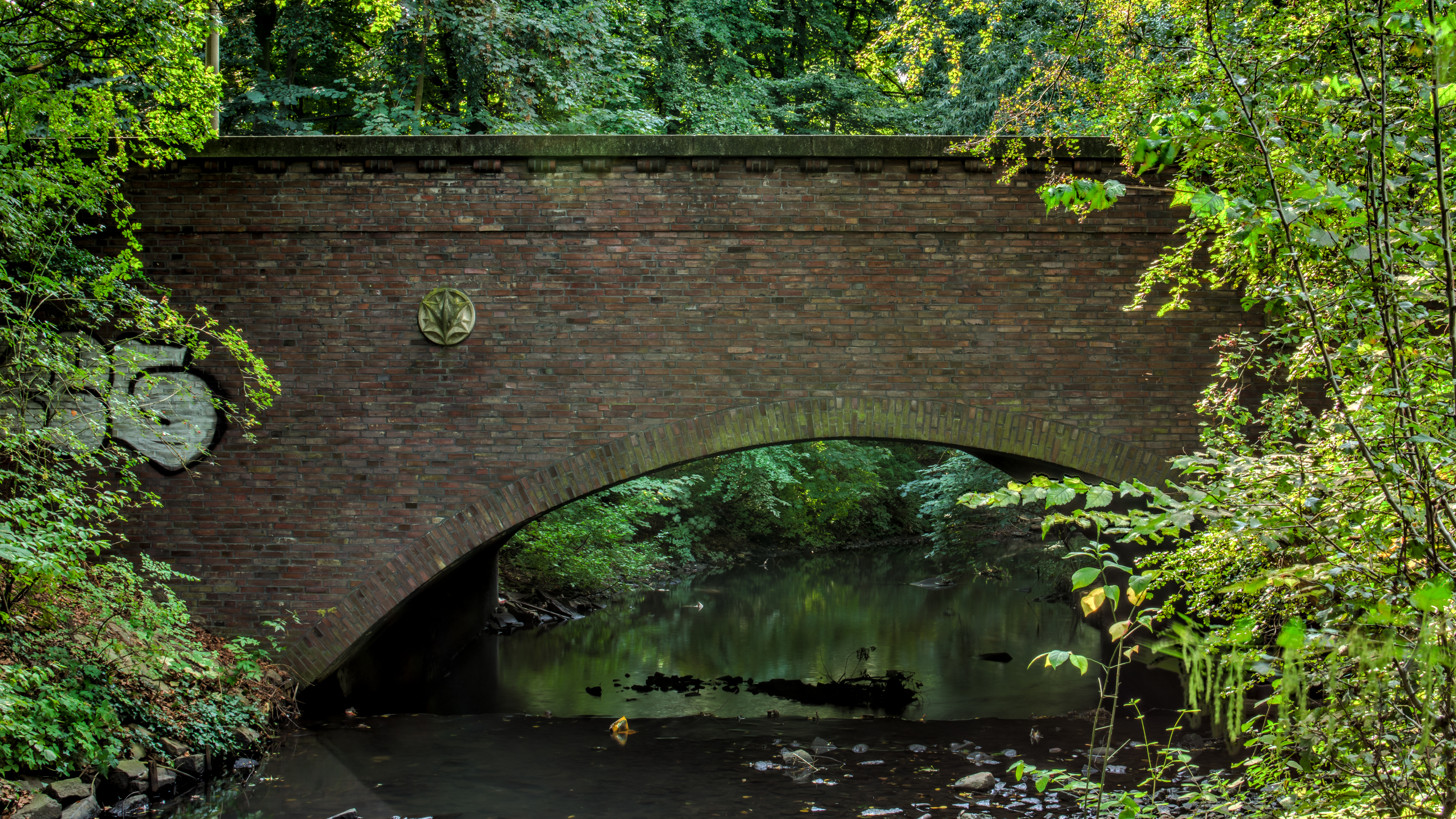 Brücke Friedrichsberger Str.This is a photograph of an architectural monument.